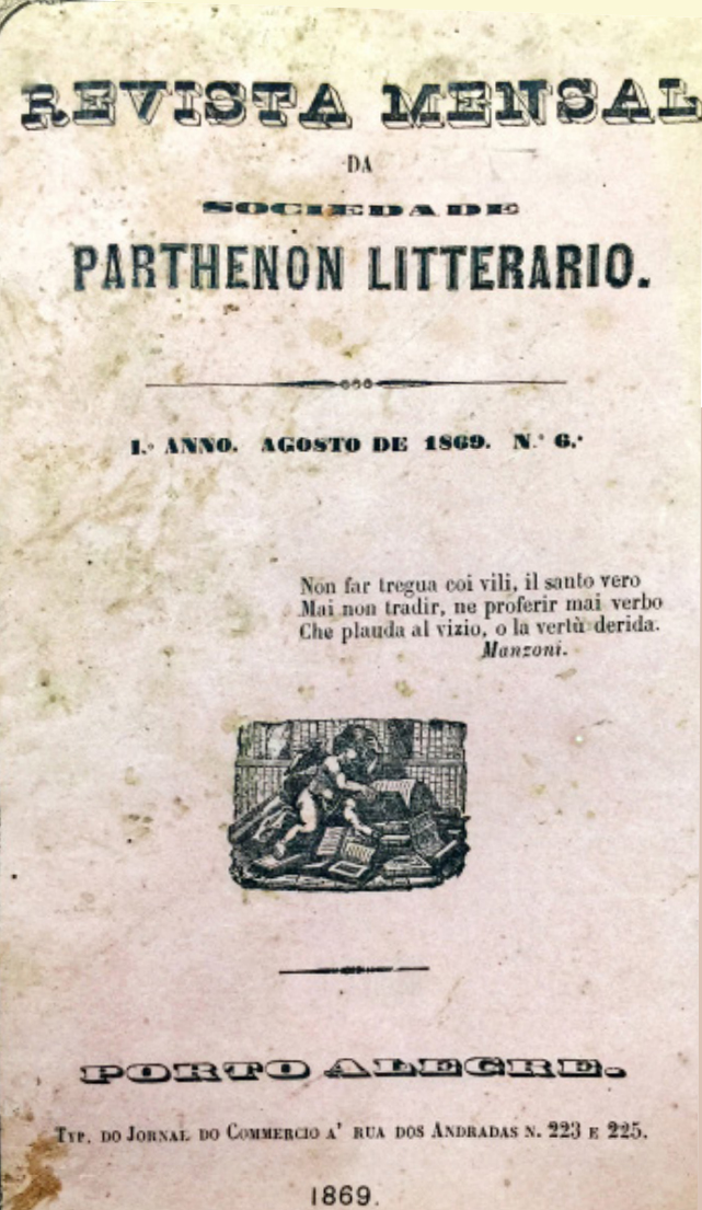 Capa da Revista Mensal do Parthenon Litterario